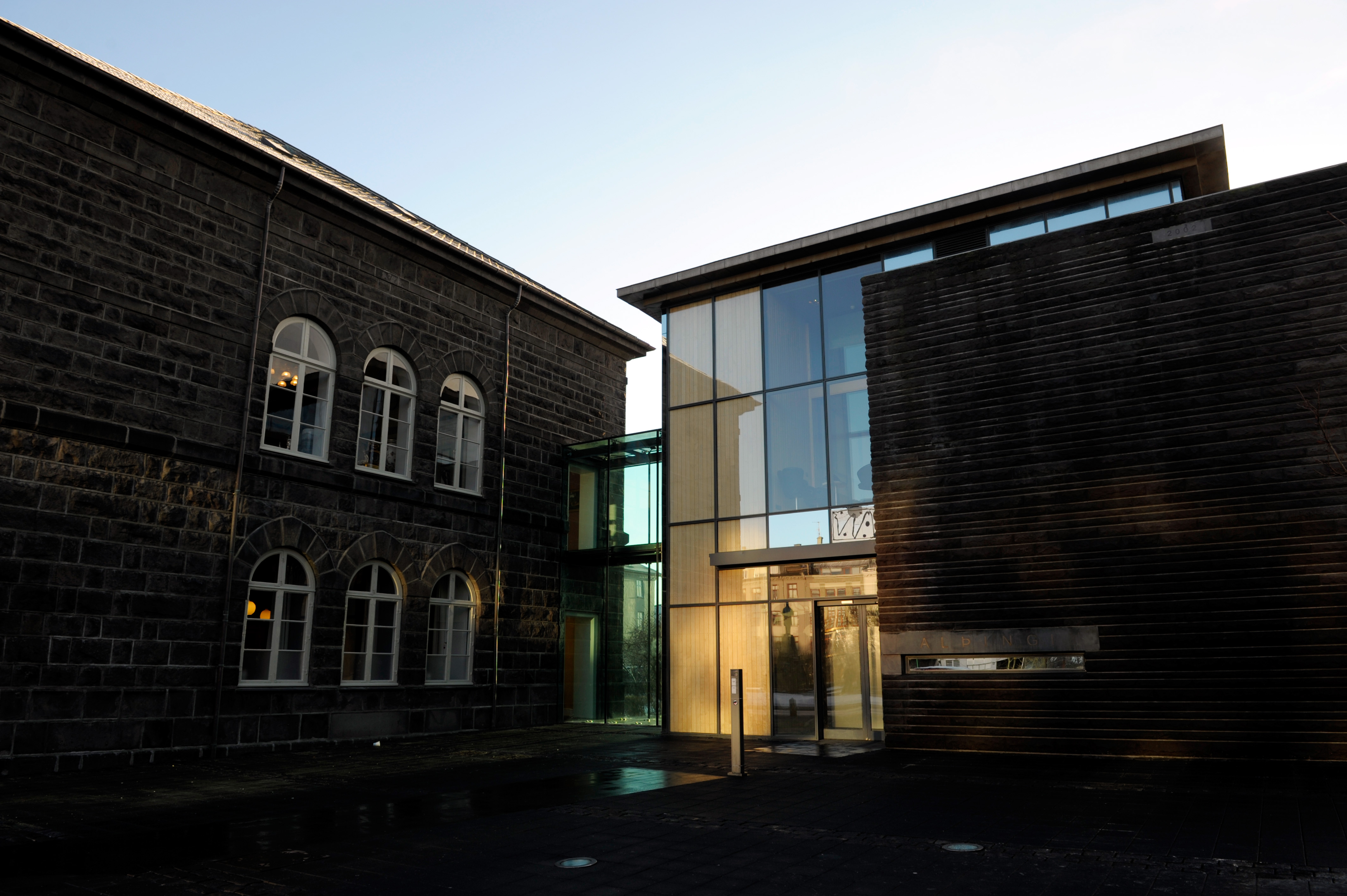 Islands parlament Althingi 2009-01-27